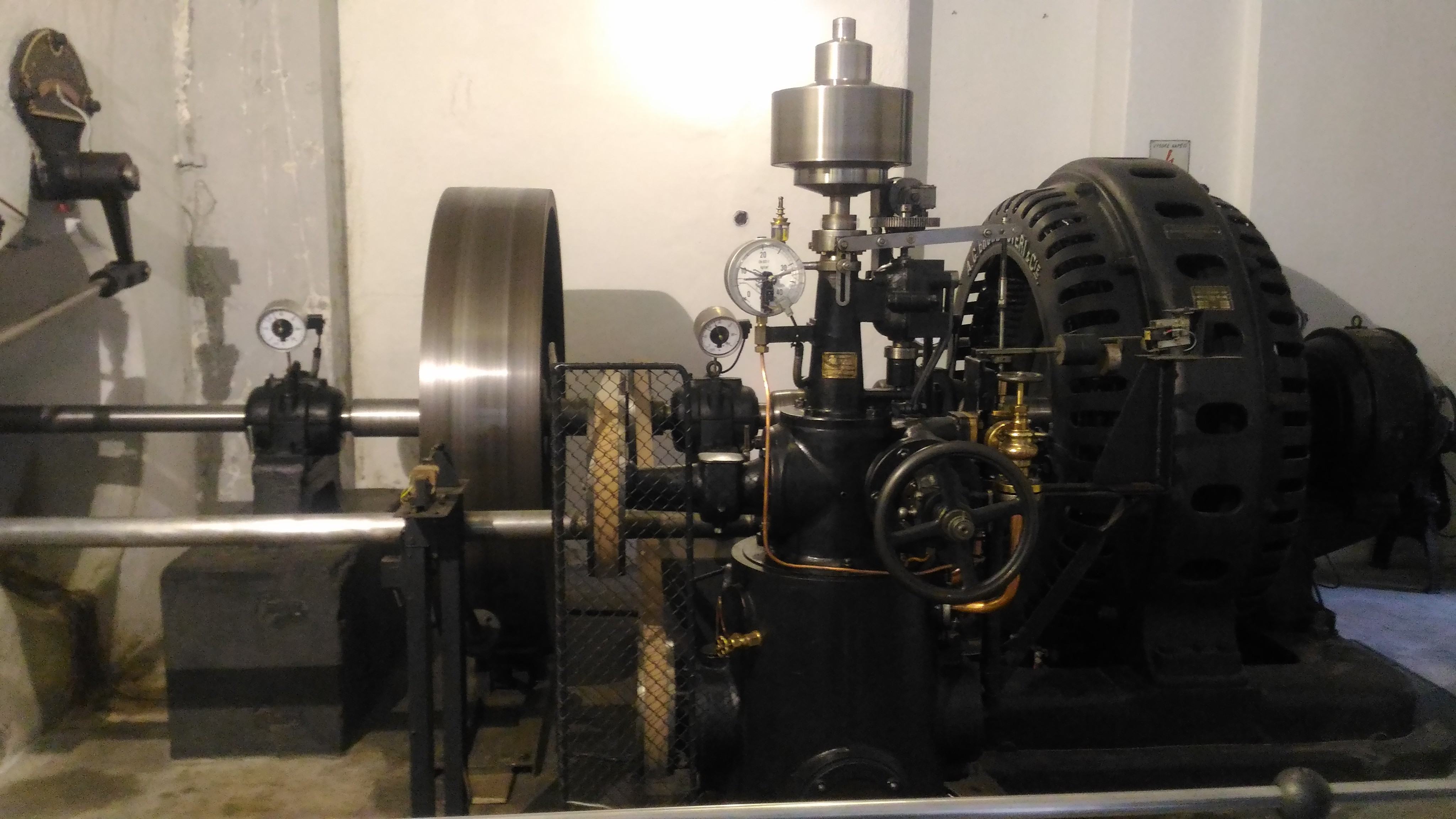 Čenkova pila - soustrojí generátoru malé vodní elektrárny